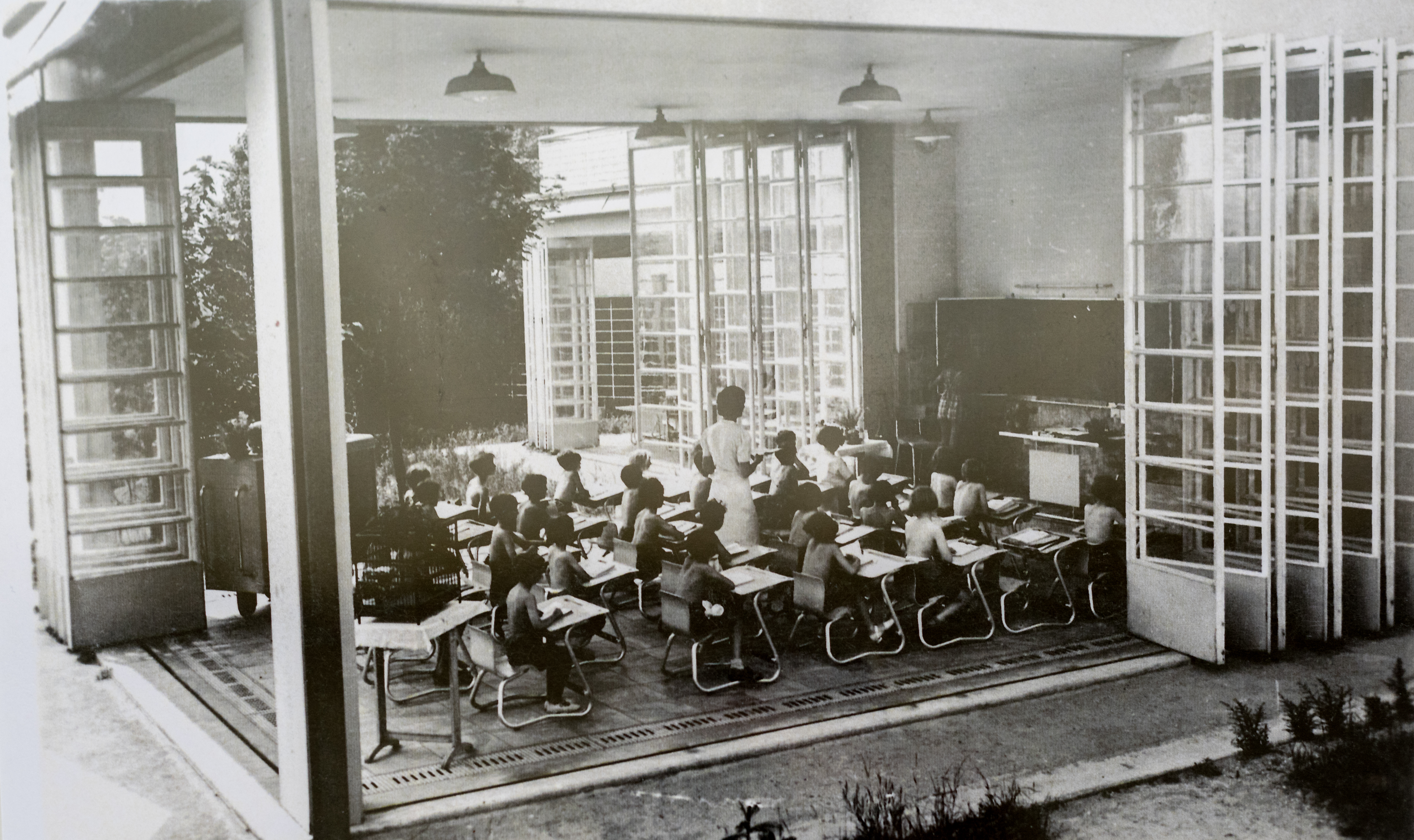 Ecole de plein Air, Suresnes